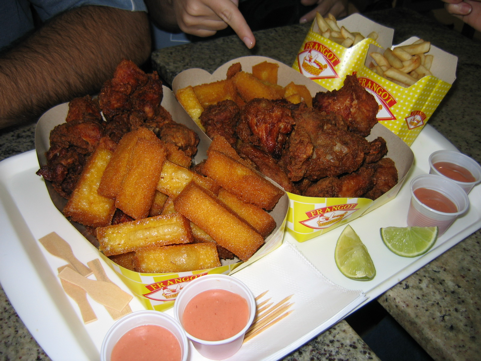 Polenta e Frango fritos, exemplos de comida extremamente gordurosa, porém muito saborosa. Fotografia obtida por Alisson Pomin e Dalton Scavassa em Maringá, Paraná, Brasil, 12 de junho de 2005.